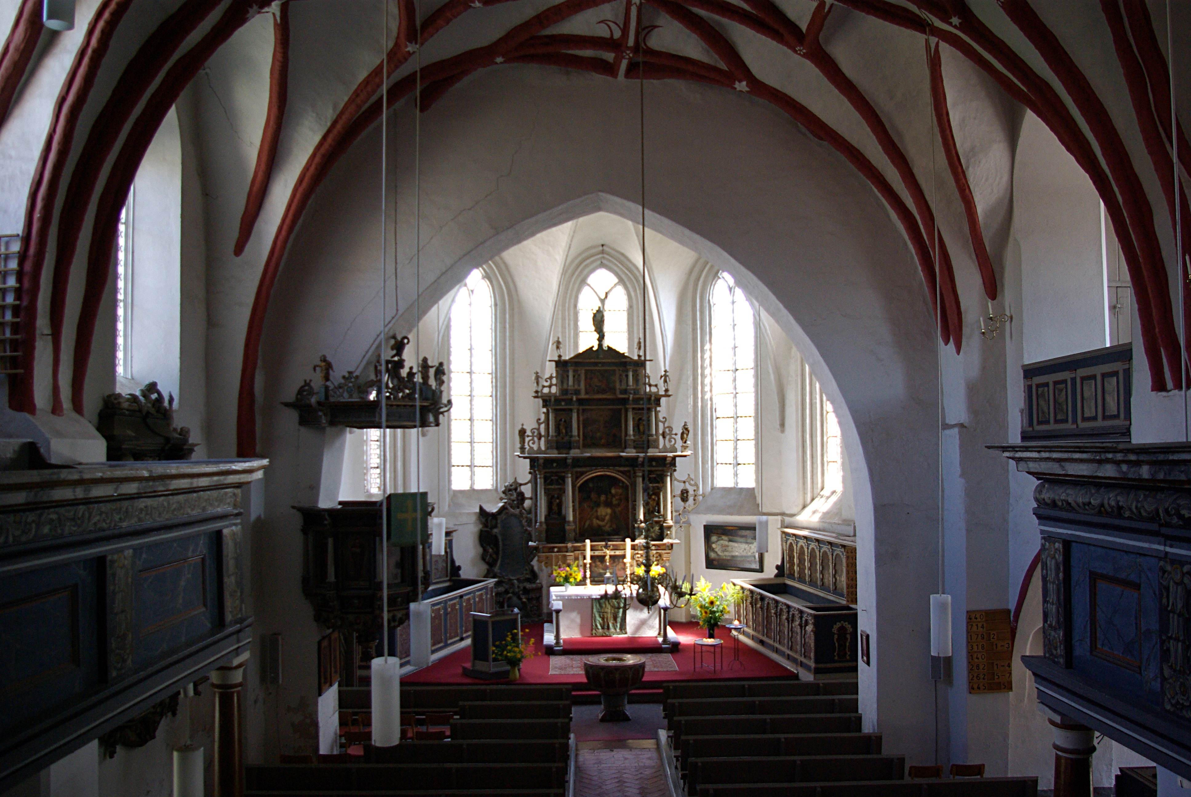 Bad Freienwalde in Brandenburg. Das Innere der Nikolaikirche. Das Bild ist von der Empore gemacht worden. Zu sehen ist der Altar und links die Kanzel.